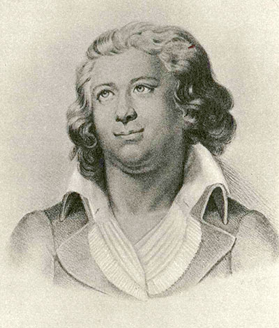 Andreas Widerberg (1766-1810)